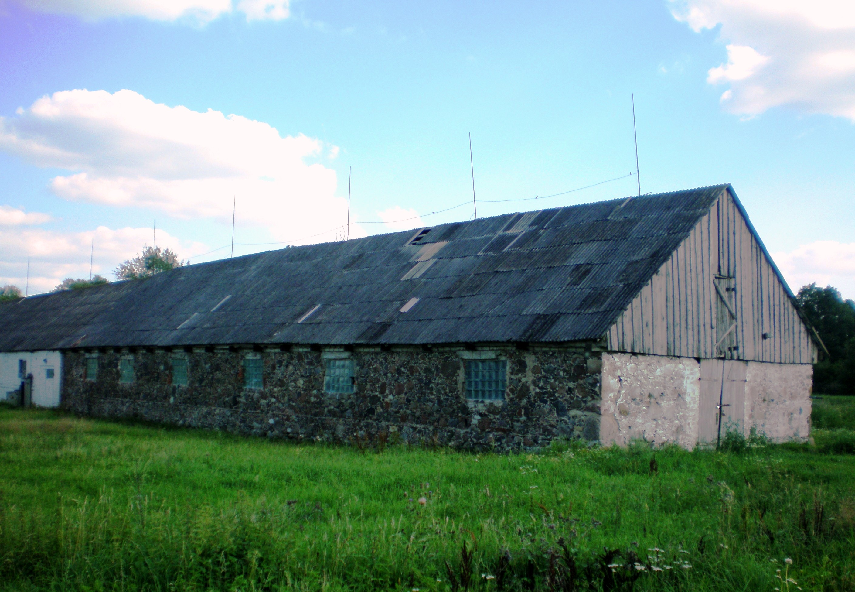 Svirnas, Jasnagurka, Kėdainių raj.